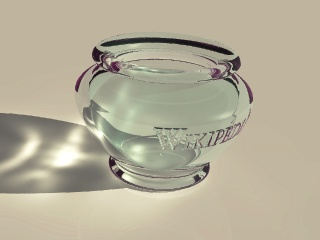 Demonstratie 3D renderen, glas. Gemaakt met open source programma (Art Of Illusion), eigen ontwerp, public domain